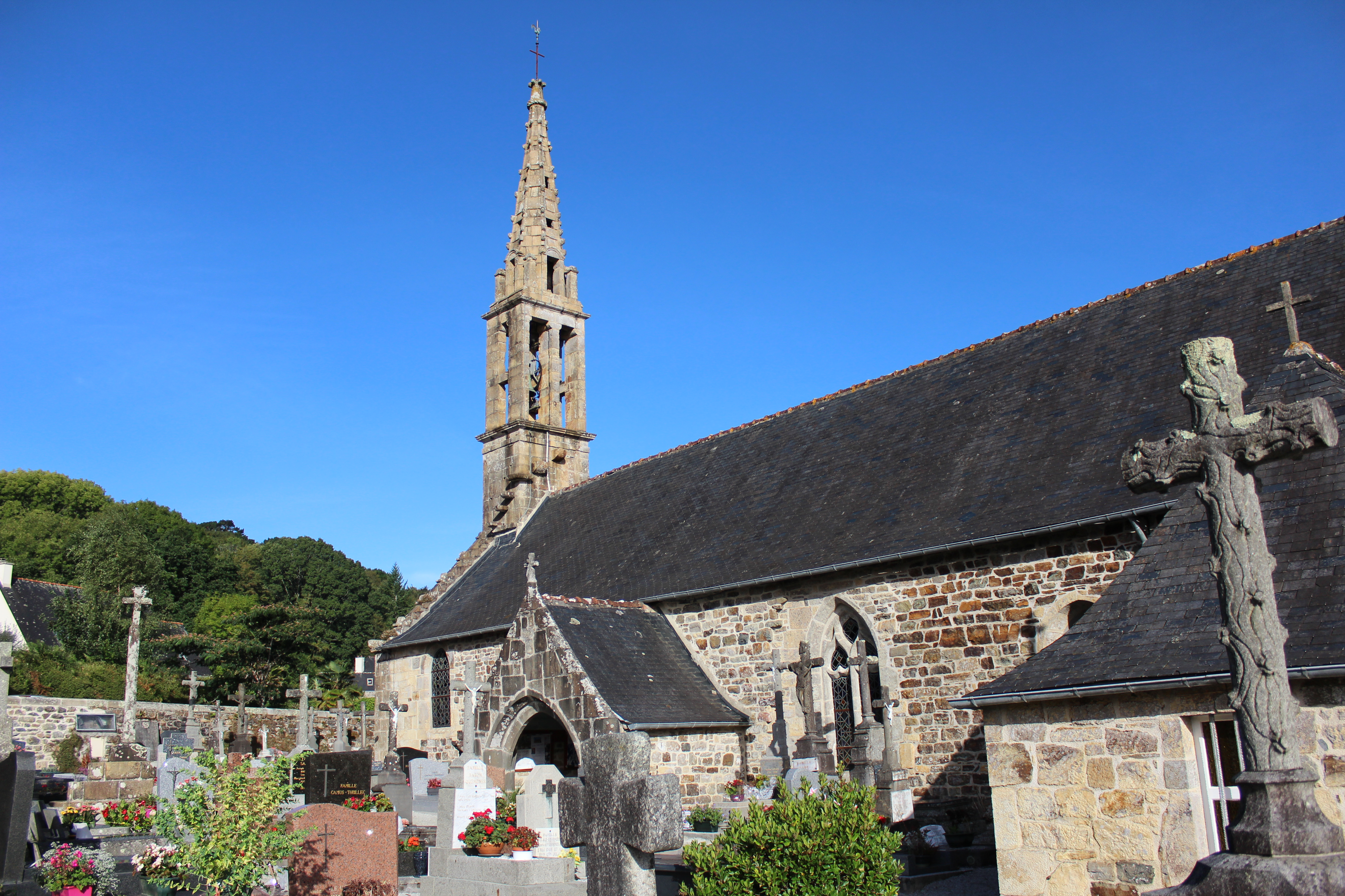 Église Notre-Dame de Landévennec 03